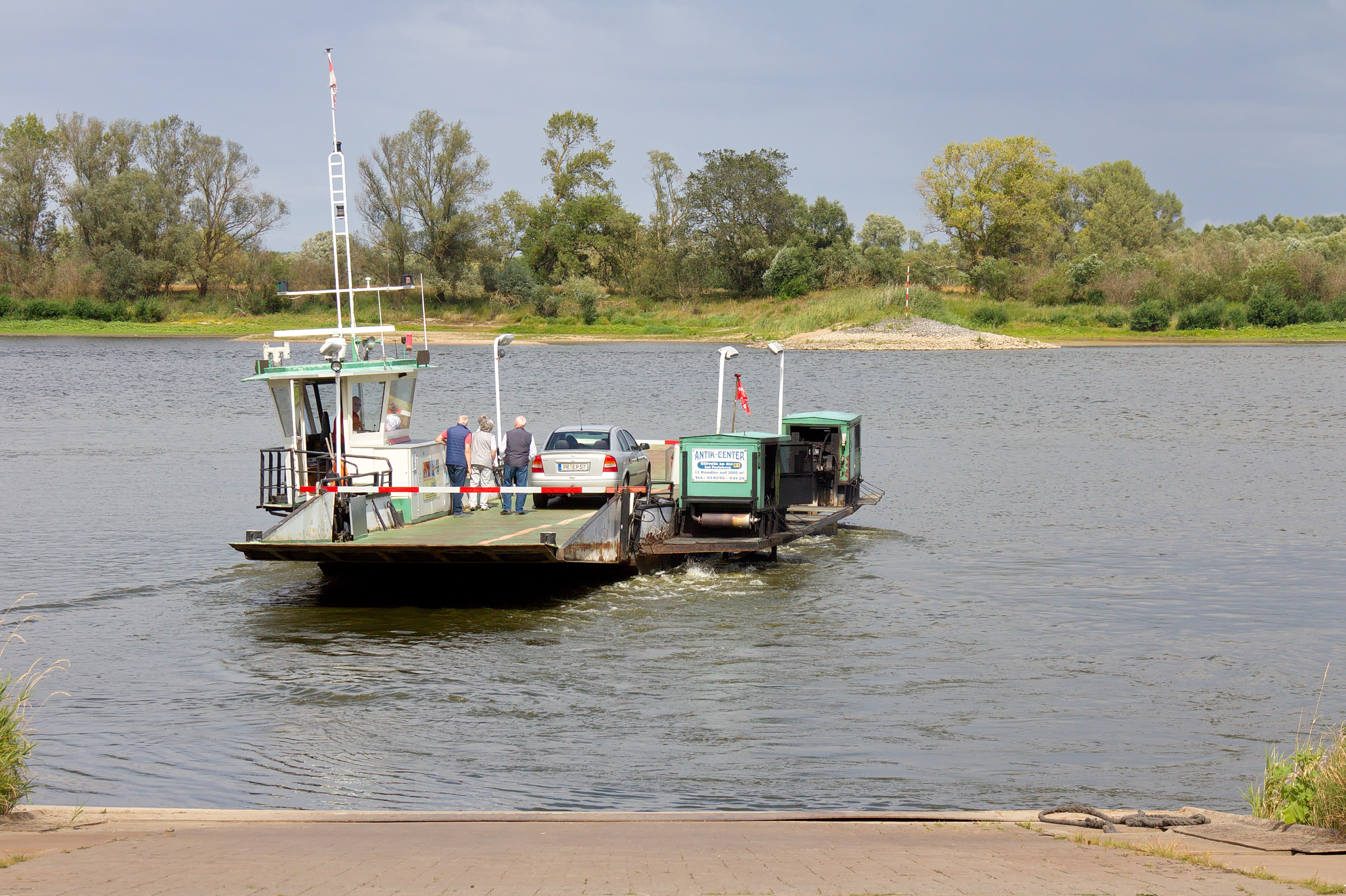 Elbfähre Ilka (Schnackenburg - Lütkenwisch) in Schnackenburg, Landkreis Lüchow-Dannenberg, Niedersachsen, Deutschland